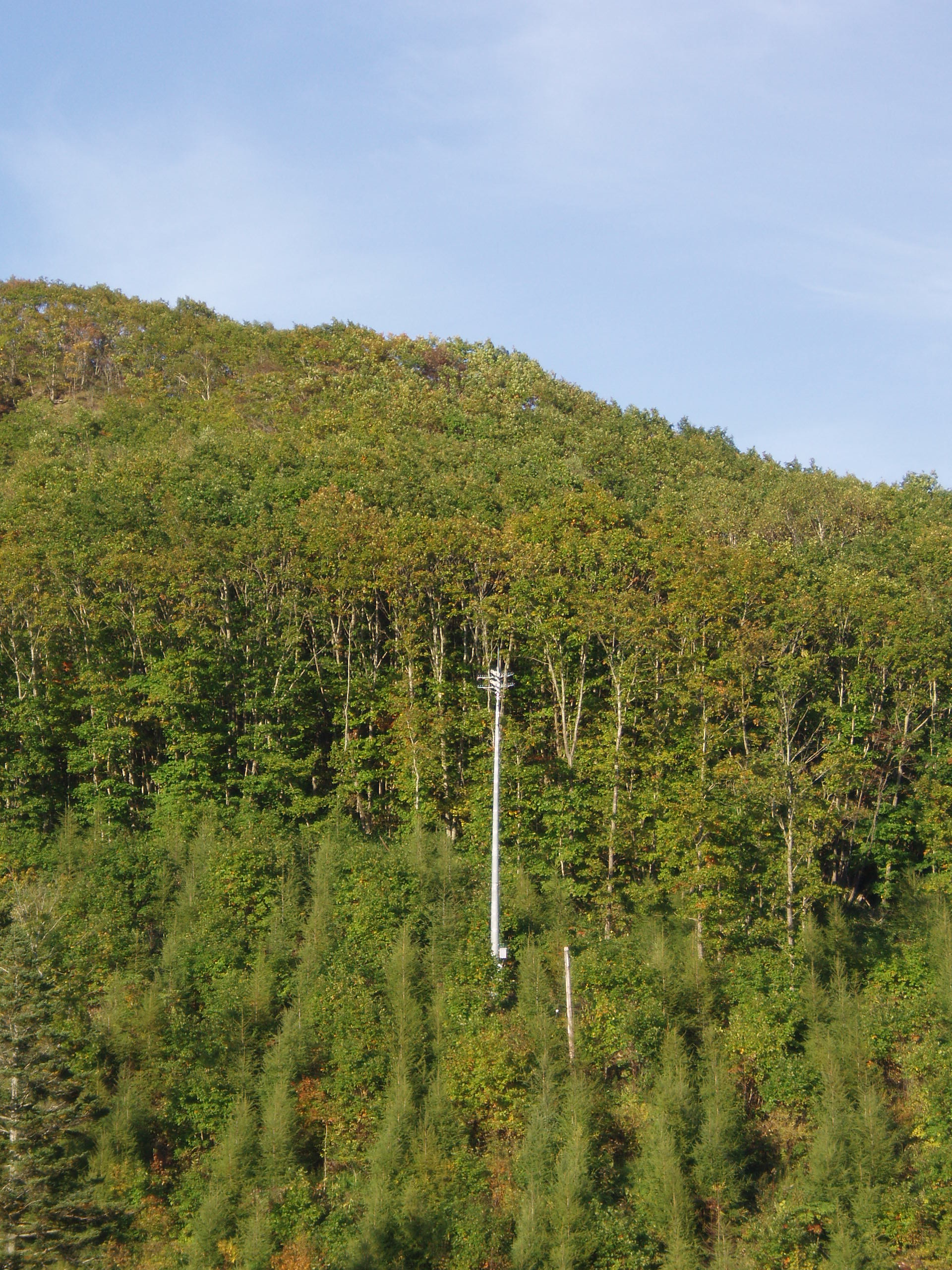 布伏内中継局（遠景）